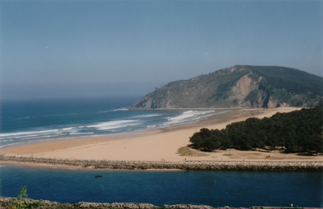 Bancos de arena de la playa de Rodiles, en Asturias Vista de la Playa de Rodiles, Javier Balaguer